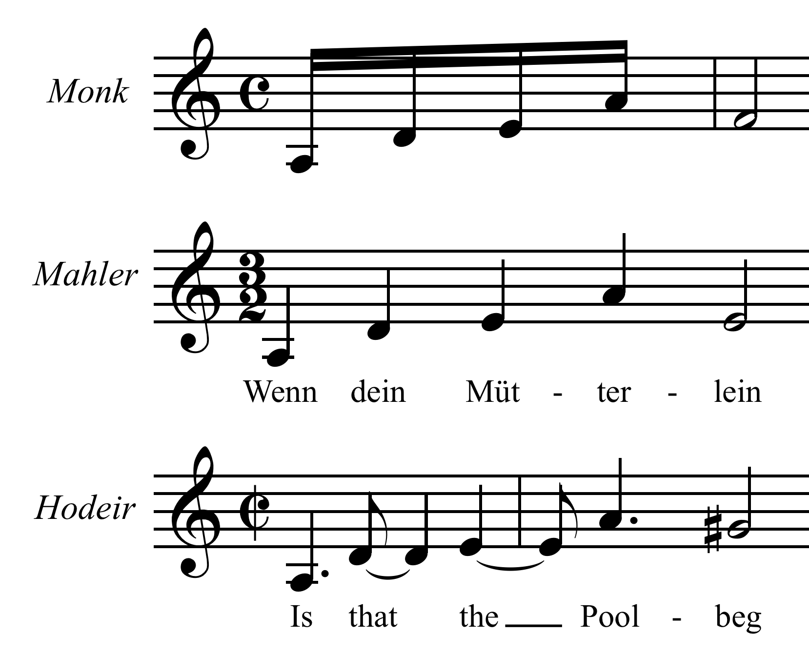 Extrait de la pièce XXIV d'Anna Livia Plurabelle d'André Hodeir